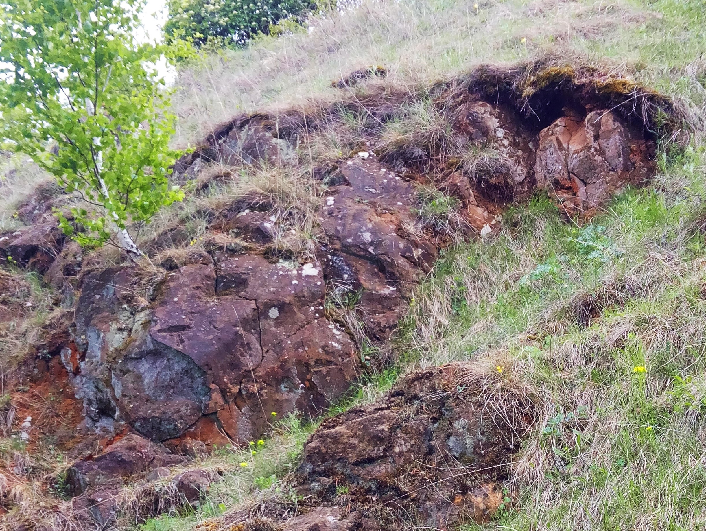 Kapuzinerstein, dunkel-rotbraun, Sandburg, Grünstadt-Asselheim